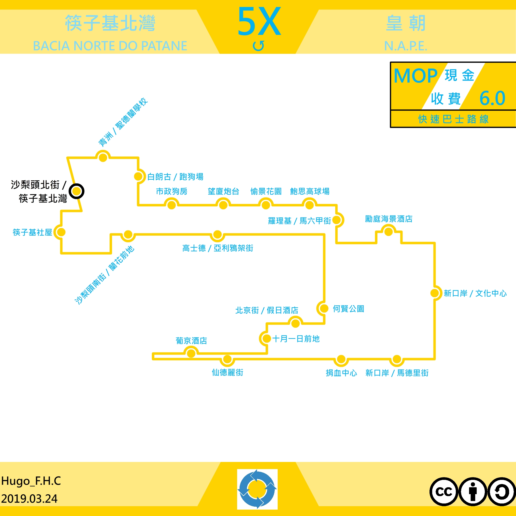 澳門巴士5X走線圖